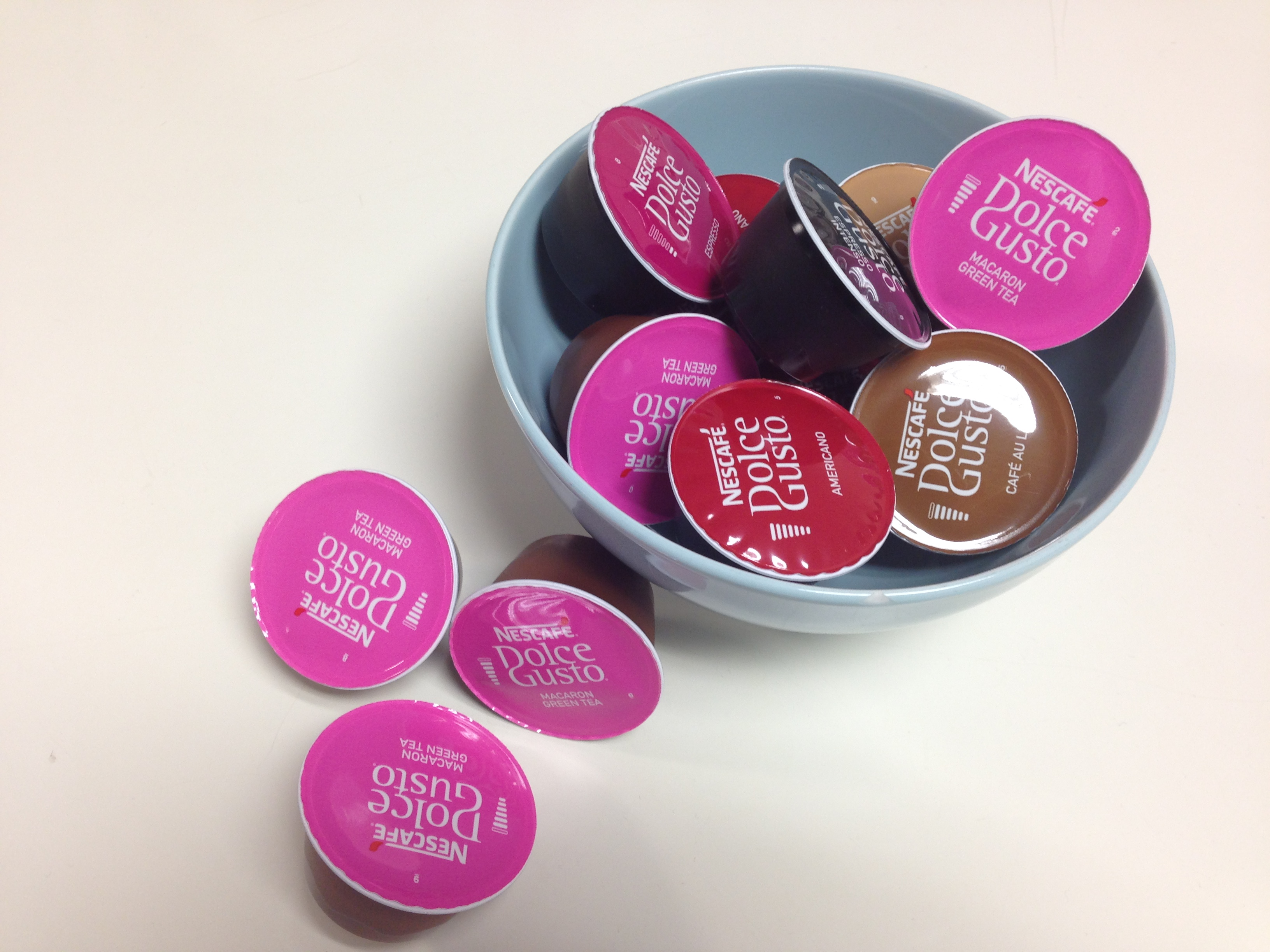 Cápsulas de cafés y tés de Nescafé Dolce Gusto: Americano, Macaron Green Tea, Café con Leche, Espresso y Cortado.